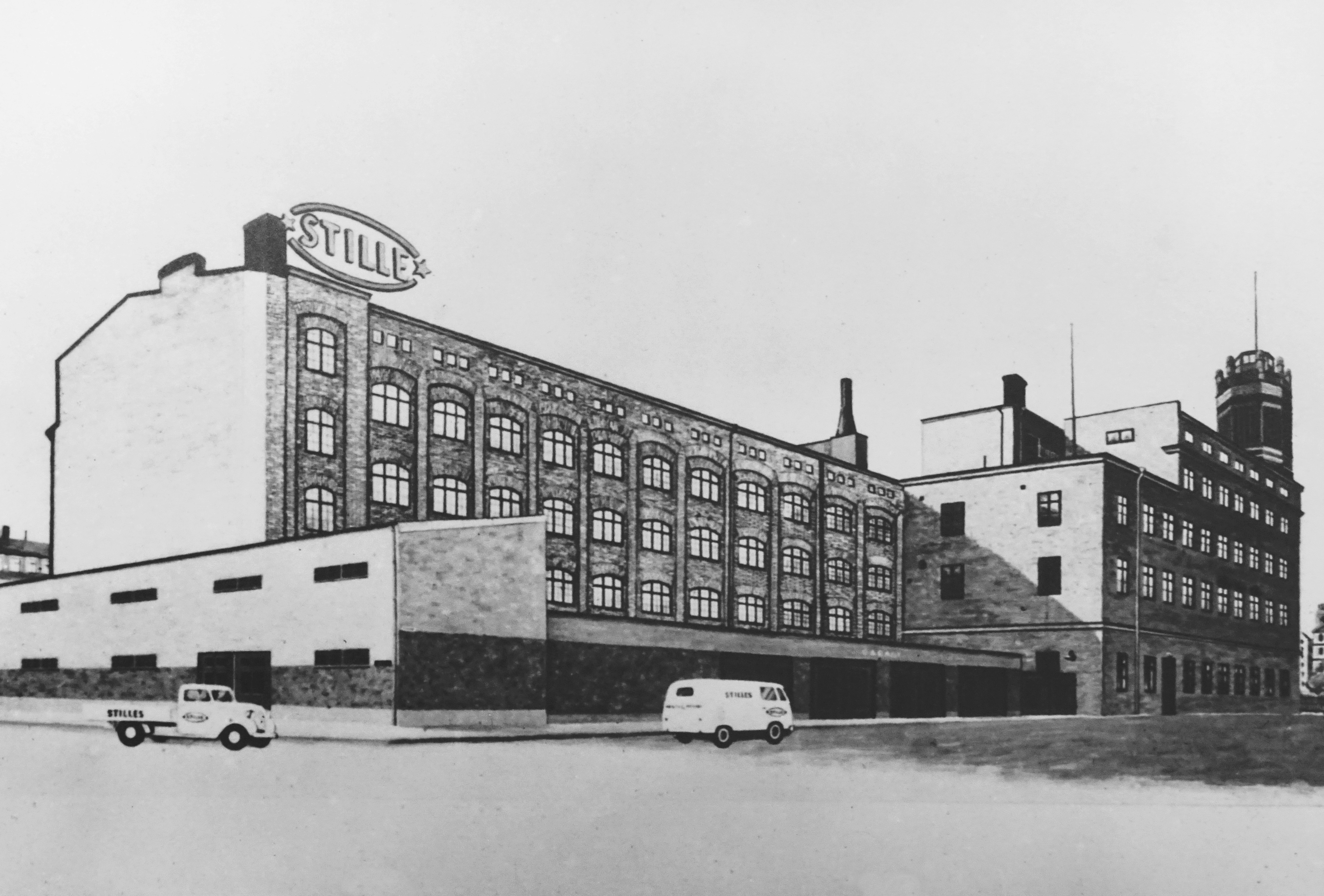 Stille-Werners fabrik på Södermalm (Fiskargatan)